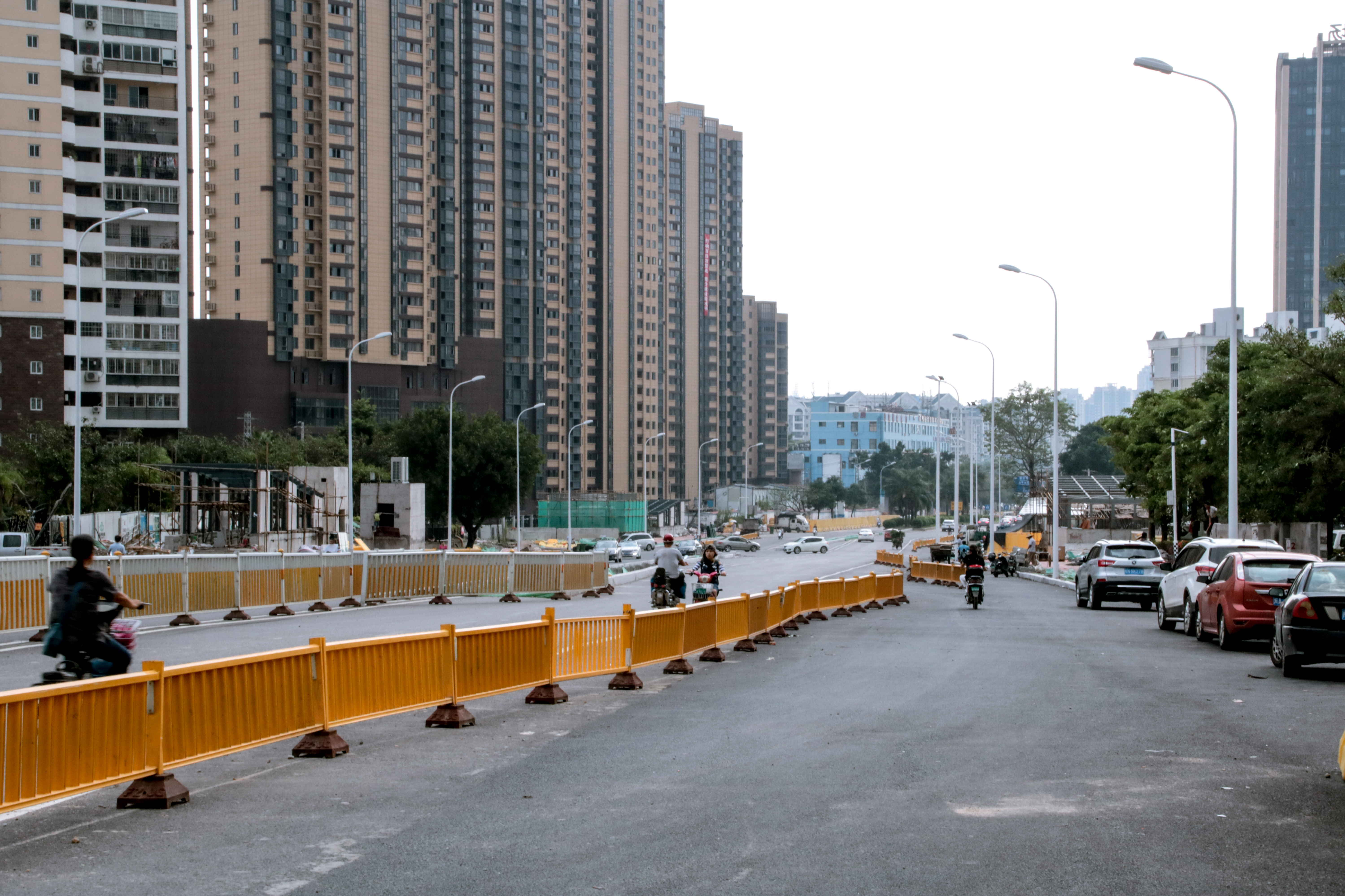 象峰站地面街景（秀峰路）